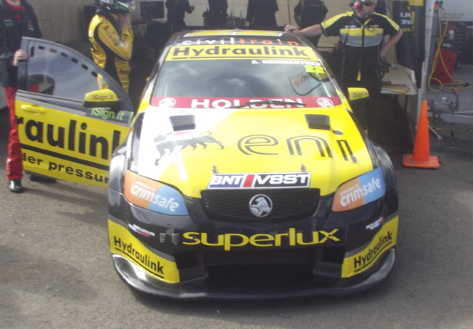 Andre Heimgartners 2014 V8ST